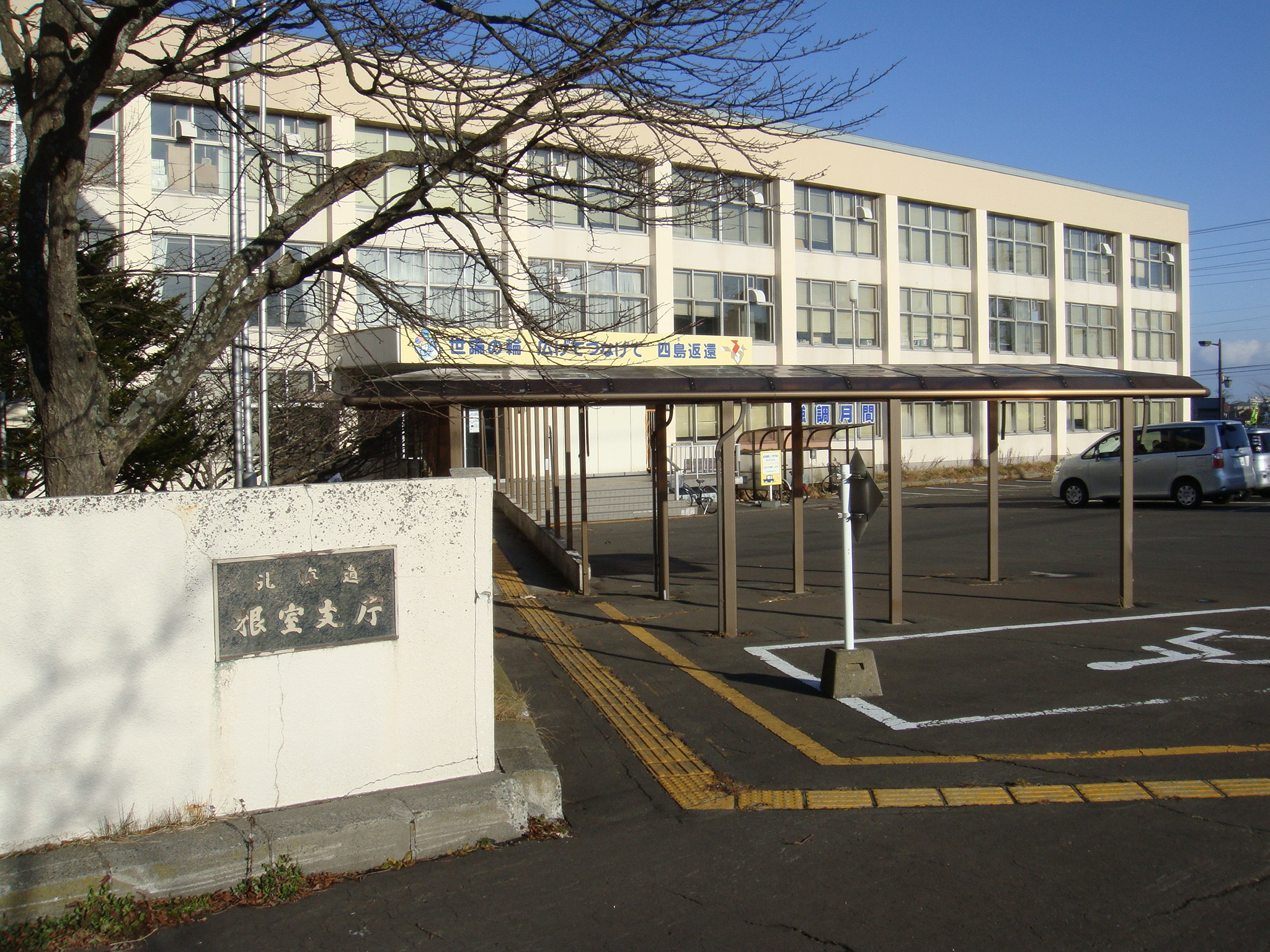 根室支廳，現已改組為根室振興局 根室支庁（現：根室振興局）